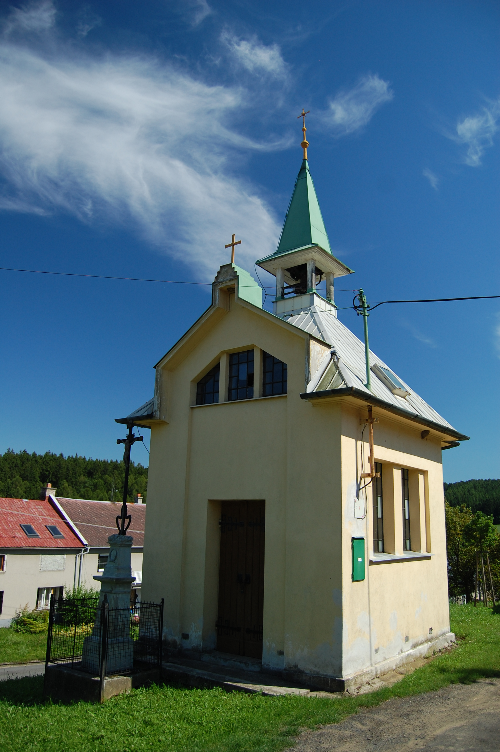 Kaplička v obci Savín - čelní pohled, Litovel, okres Olomouc